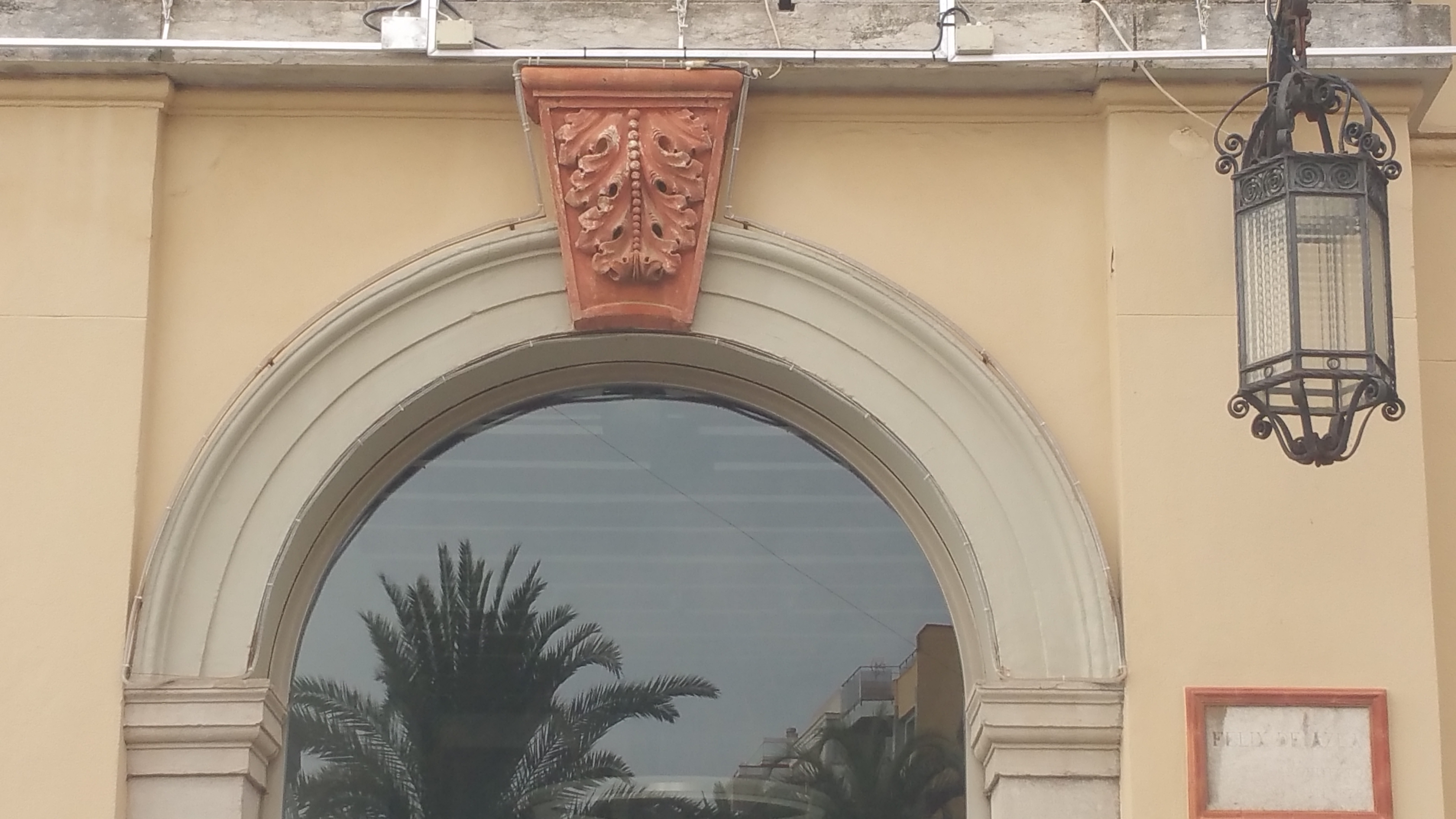 Ajuntament (Lloret de Mar)